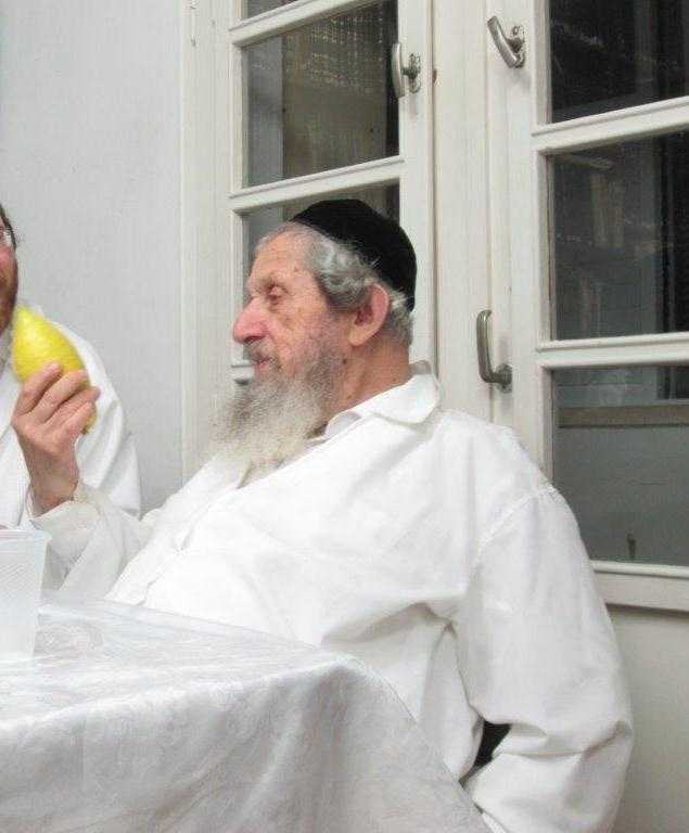 הרב דב לנדו, במוצאי יום כיפור